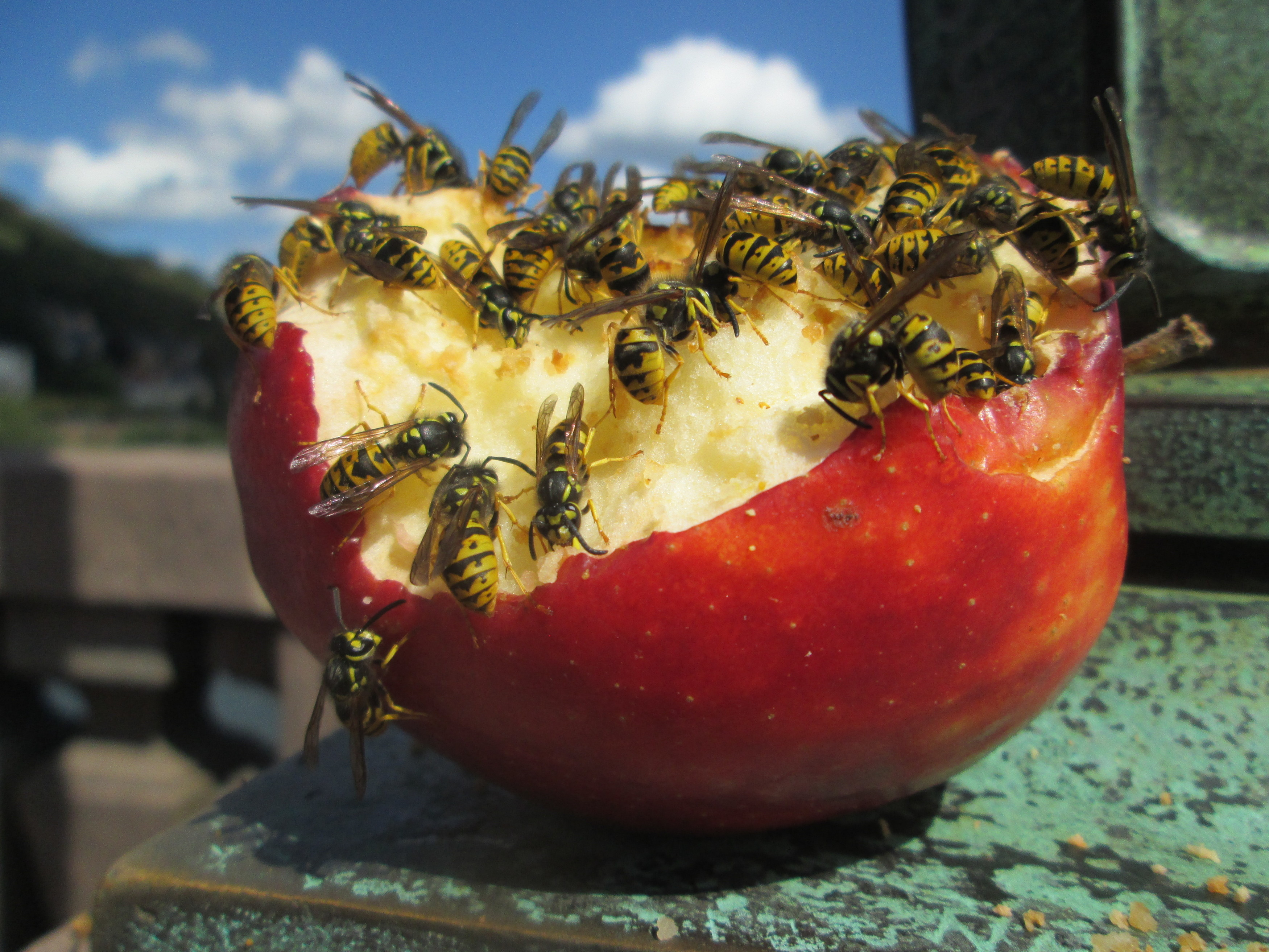 Wespen an einem Apfel auf der Alten Brücke in Heidelberg